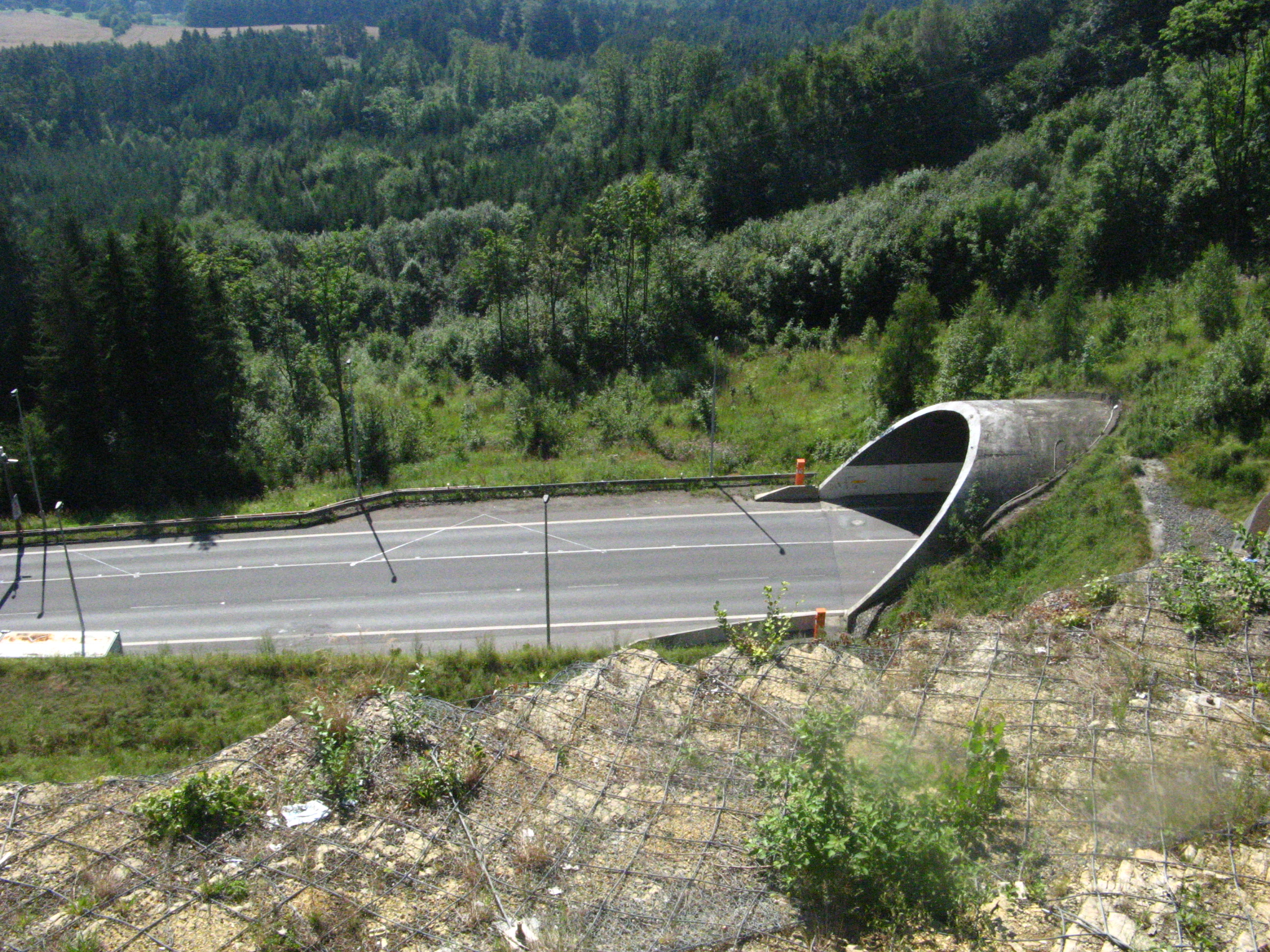 Tunel Hřebeč, vyústění ve směru na Moravskou Třebovou, okres Svitavy